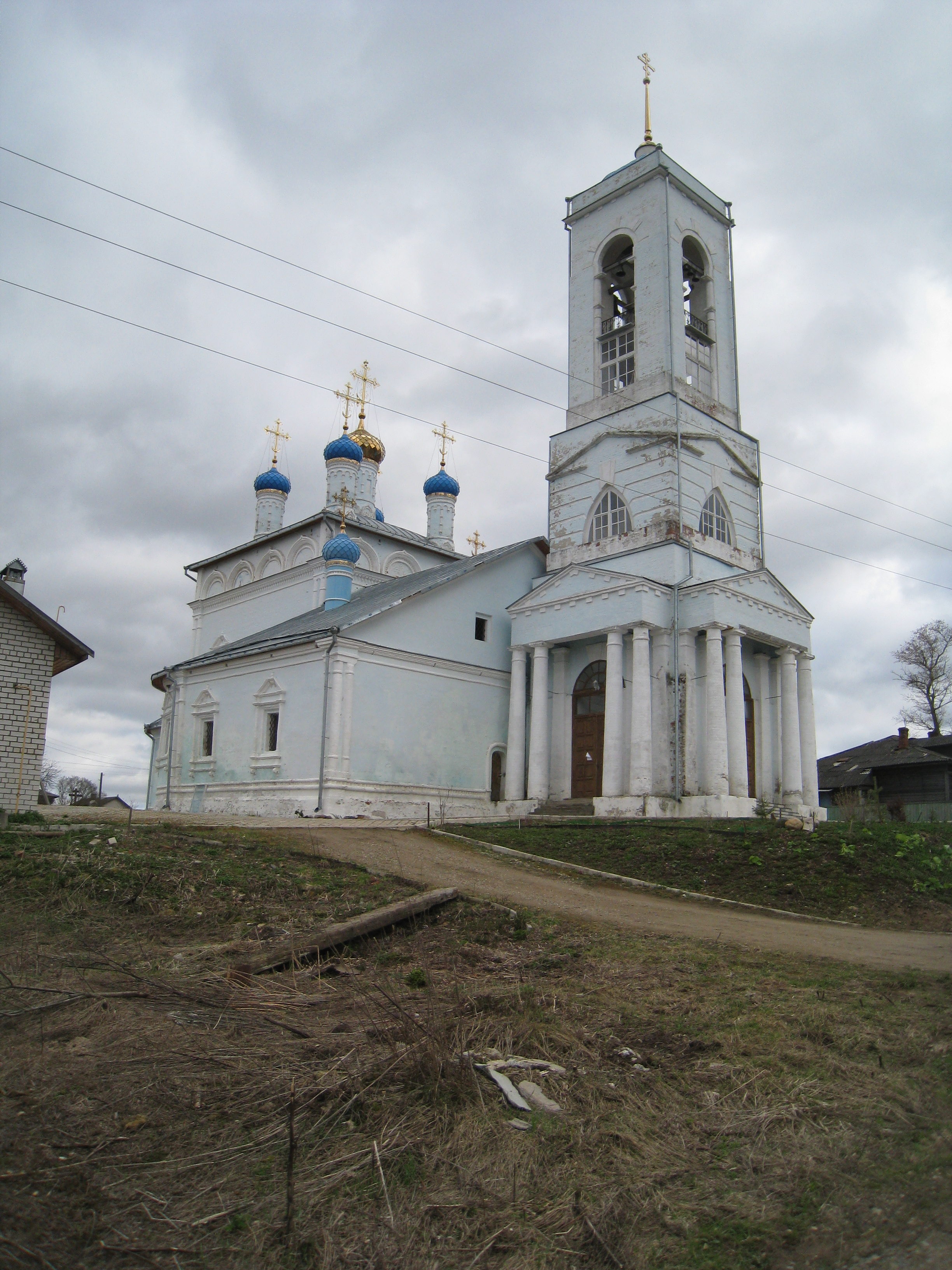 Церковь иконы Казанской Божией Матери (церковь Казанская): Старая Слобода, Александровский район, Владимирская область